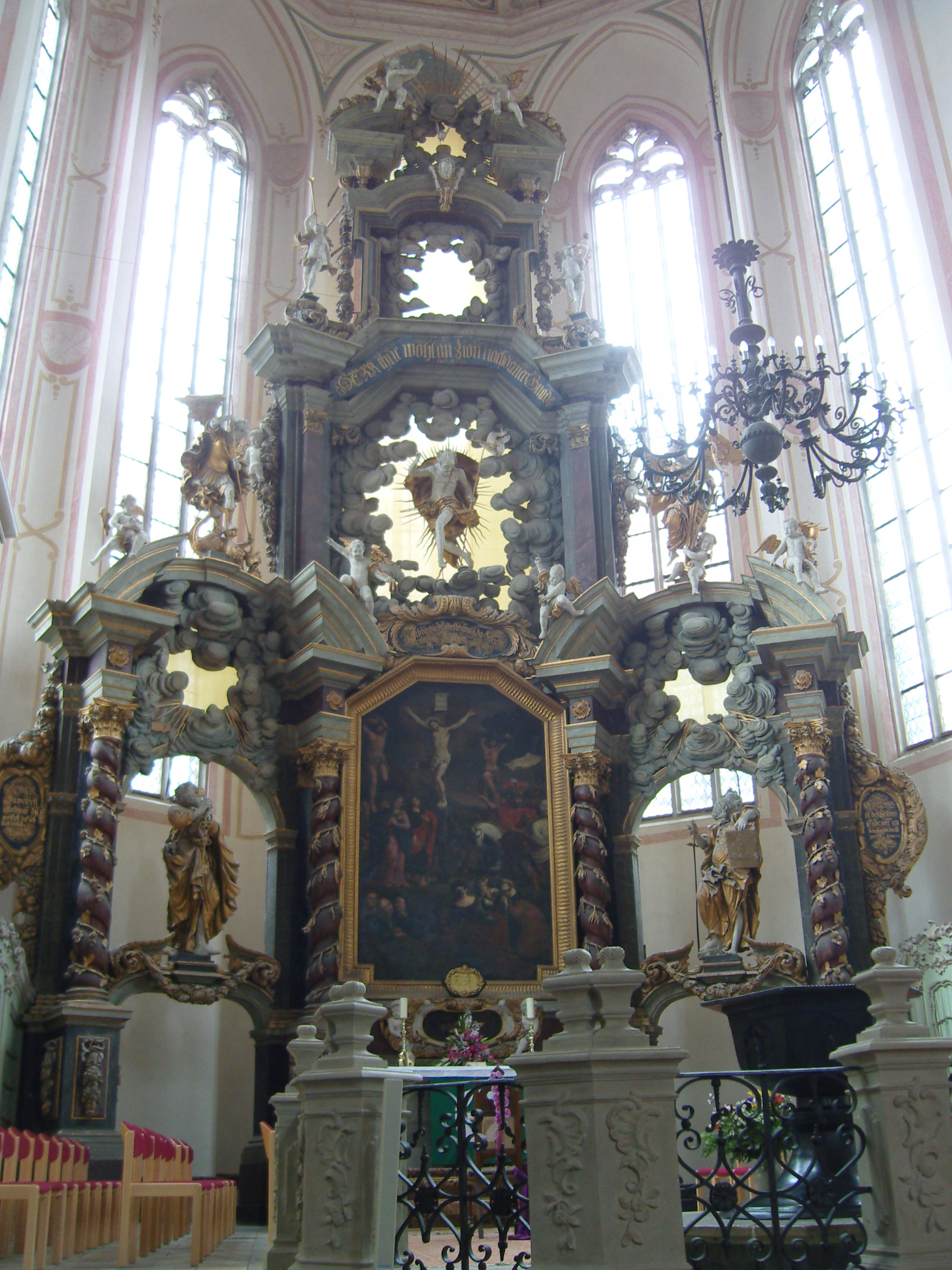 Innenausstattung der Stadtkirche St. Wenzel in Naumburg (Saale); Altar